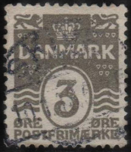 Почтовая марка Дании с рисунком "цифра в овале", 1905 год.